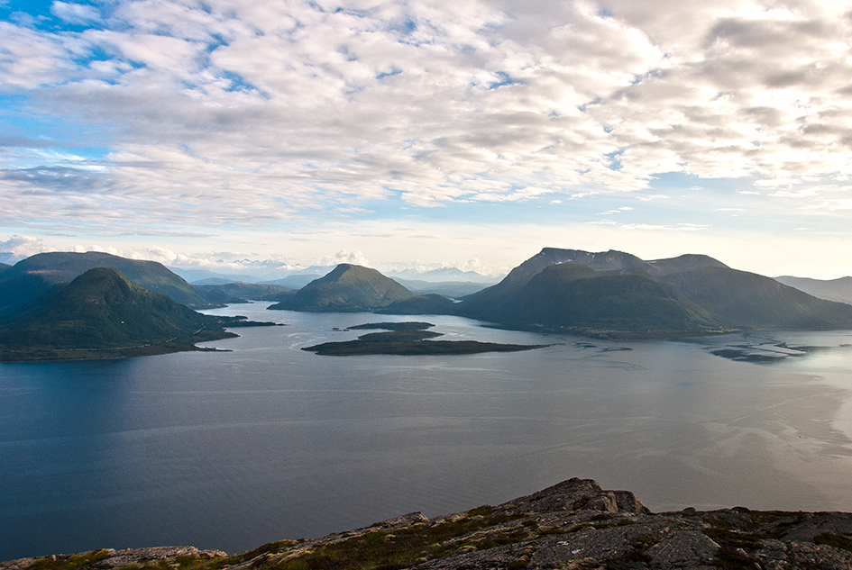 Insel Midøya Kommune Midsund Berggipfel des Blokallen 522 müA